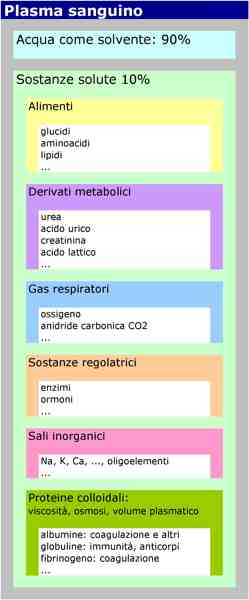 Grafica: Medicina:Fisiologia, Anatomia: Ematologia: composizione, plasma sanguigno, solvente, acqua, soluti, alimentari, glucidi, aminoacidi, lipidi, metabolici, respiratori, sostanze regolatrici, sali anorganici, proteine, colloidali, medicina popolare, complementare, laica, non convenzionale